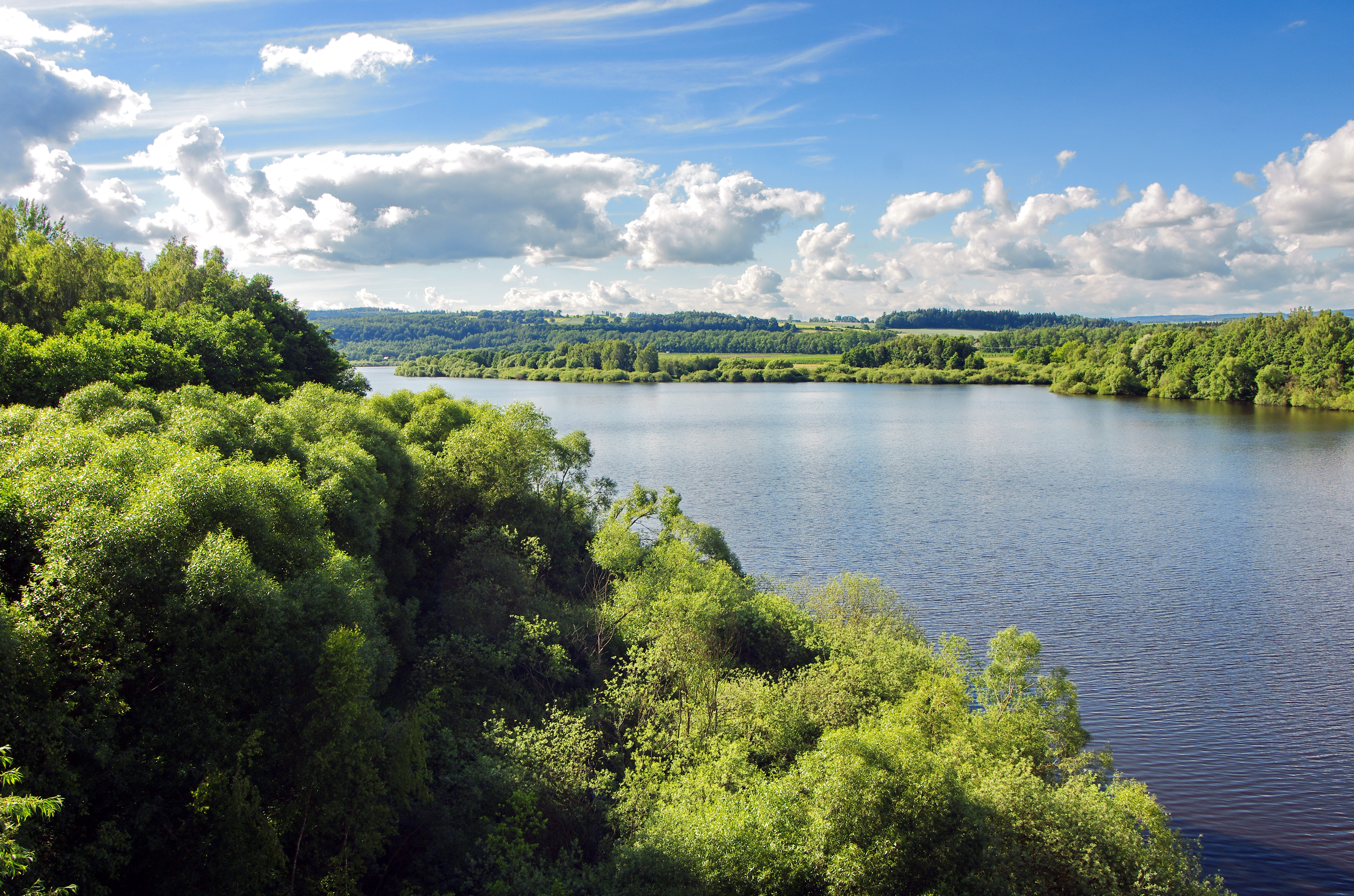 Vodní nádrž Skalka na Ohři, okres Cheb